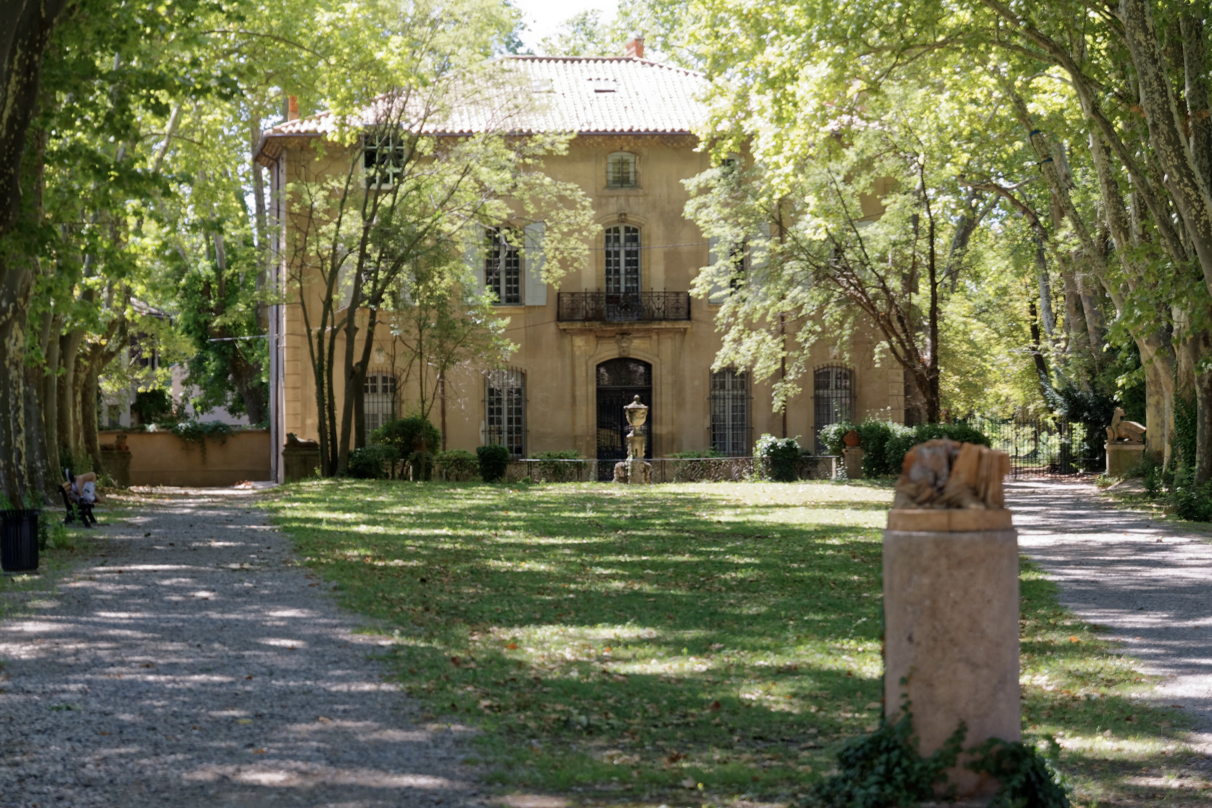 Bastide du Jas de Bouffan, Elternhaus von Paul Cézanne